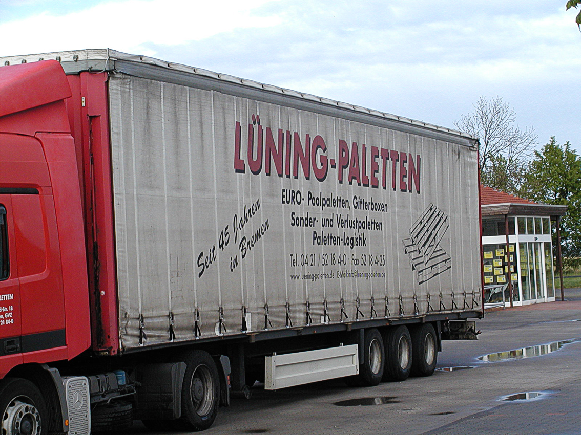 Ein Auflieger "Tautliner"